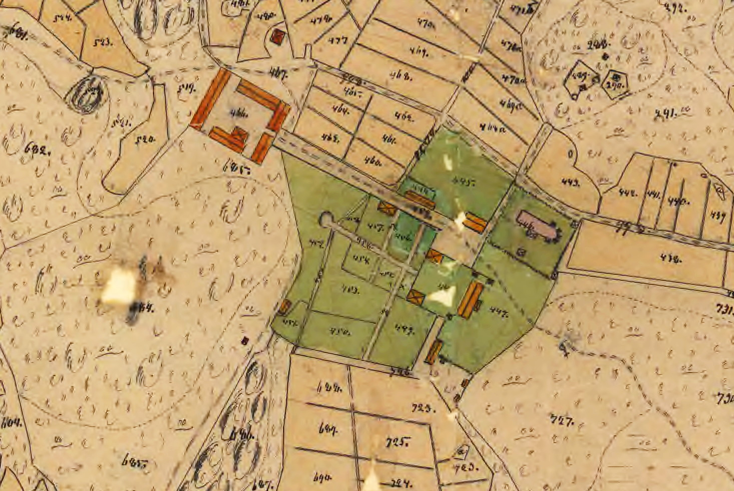 Arnöbergs ägor (detalj visande gårdsbebyggelsen)